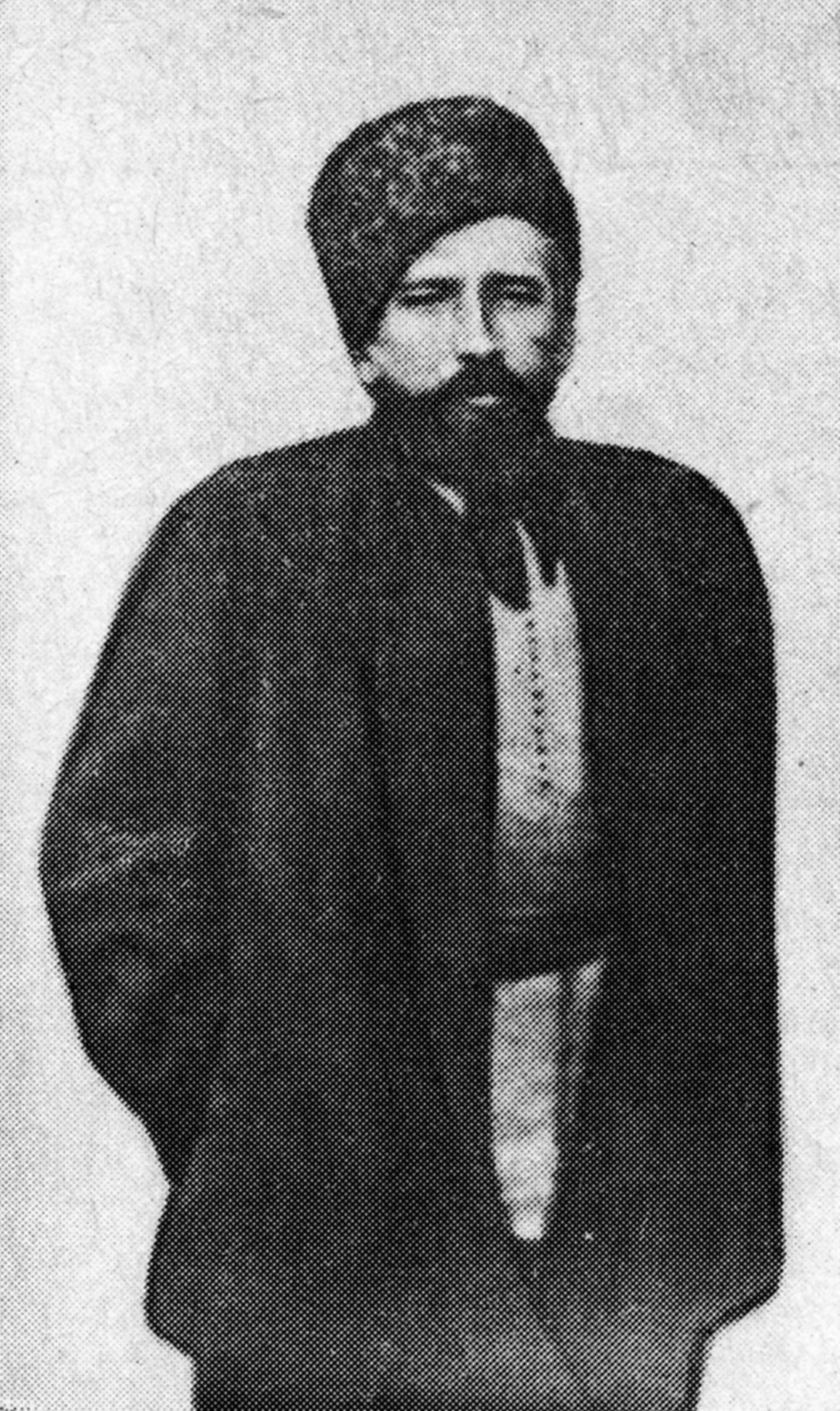 Беларуская (тарашкевіца): Фатаздымак беларускага паэта і празаіка Каруся Каганца (Казімера Кастравіцкага)